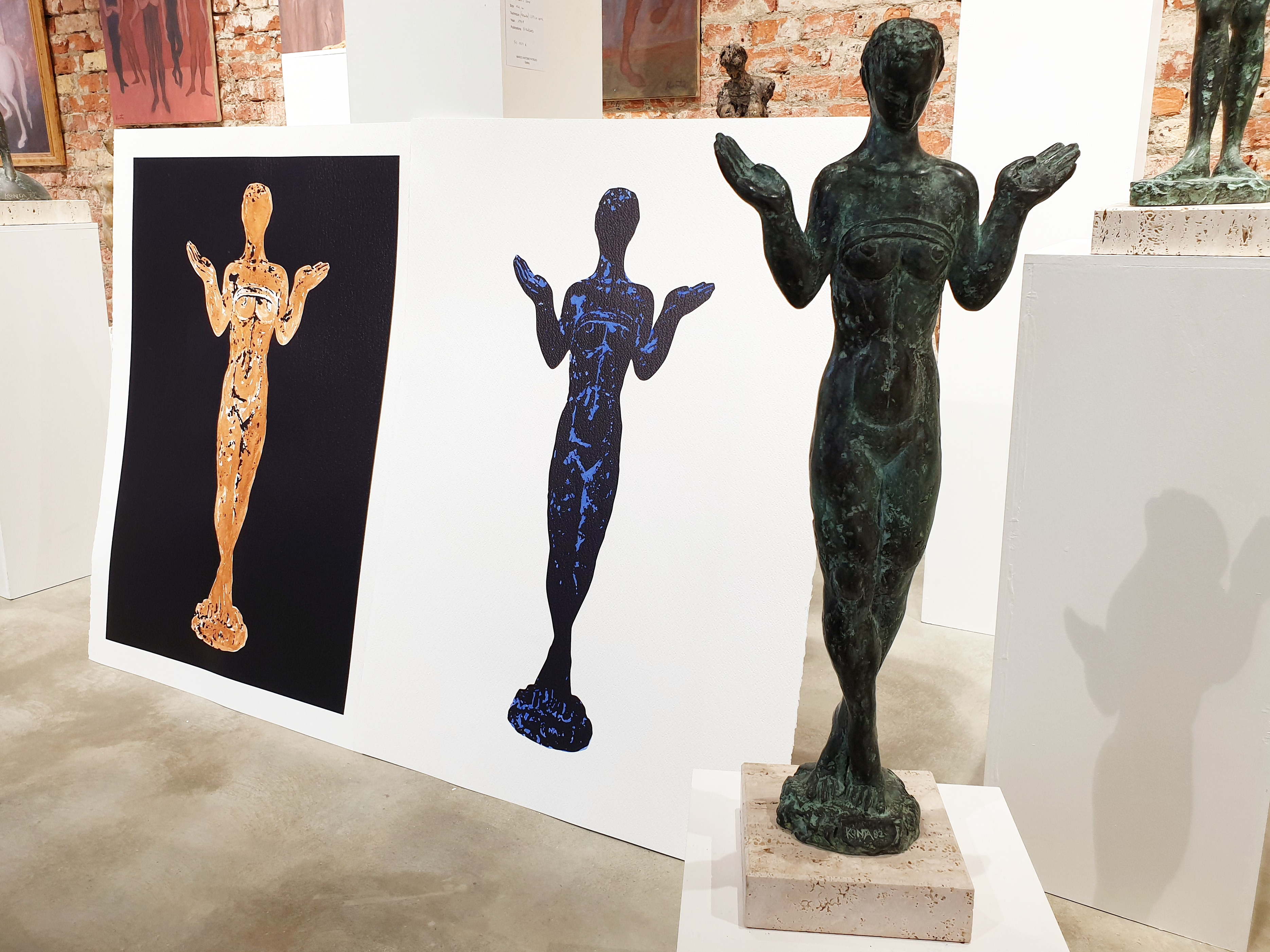 Kiparske siluete, kombinirana tehnika, godina 2019